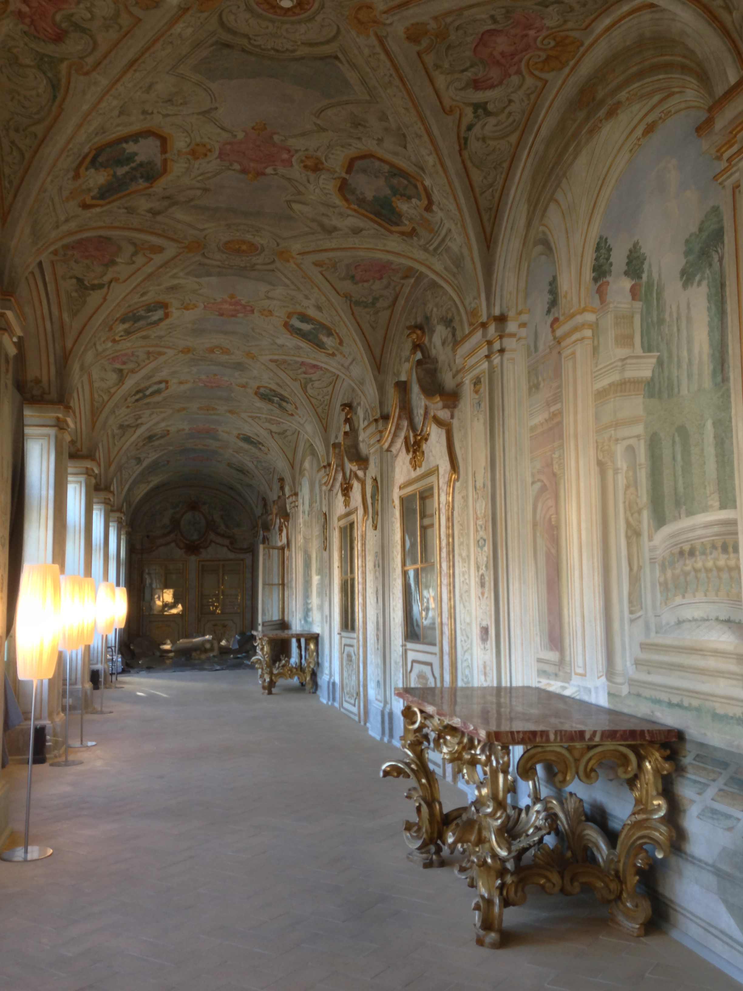 Galleria del Piano Nobile al primo piano del Museo Carandente, Palazzo Collicola - Arti visive, Spoleto